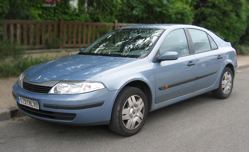 Renault Laguna II Personal picture